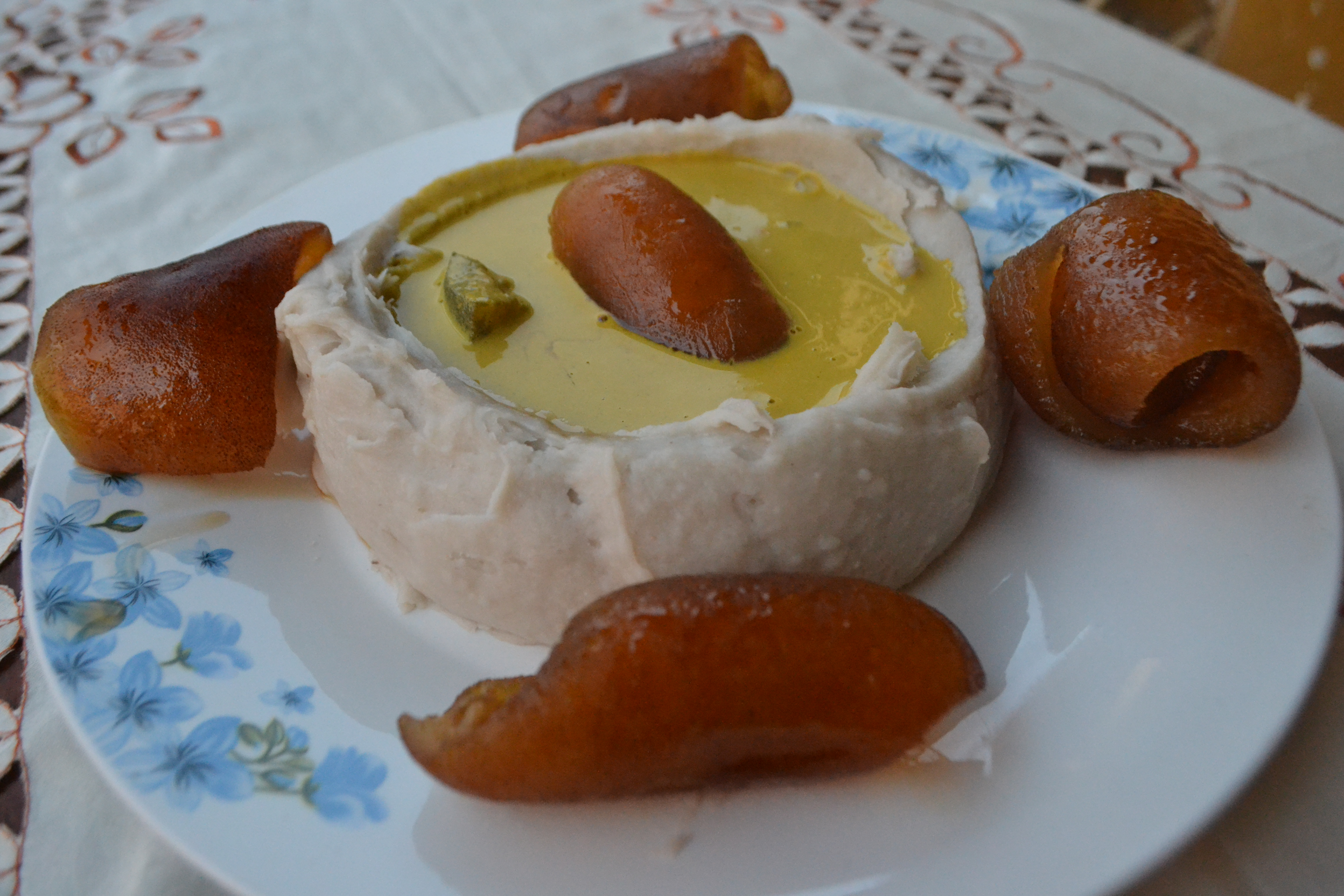 Un plat de taro (Achu, Achou) avec sauce jaune et peau de boeuf. plat traditonne du cameroun plus précisement de la région de l'ouest , pays bamiléké.